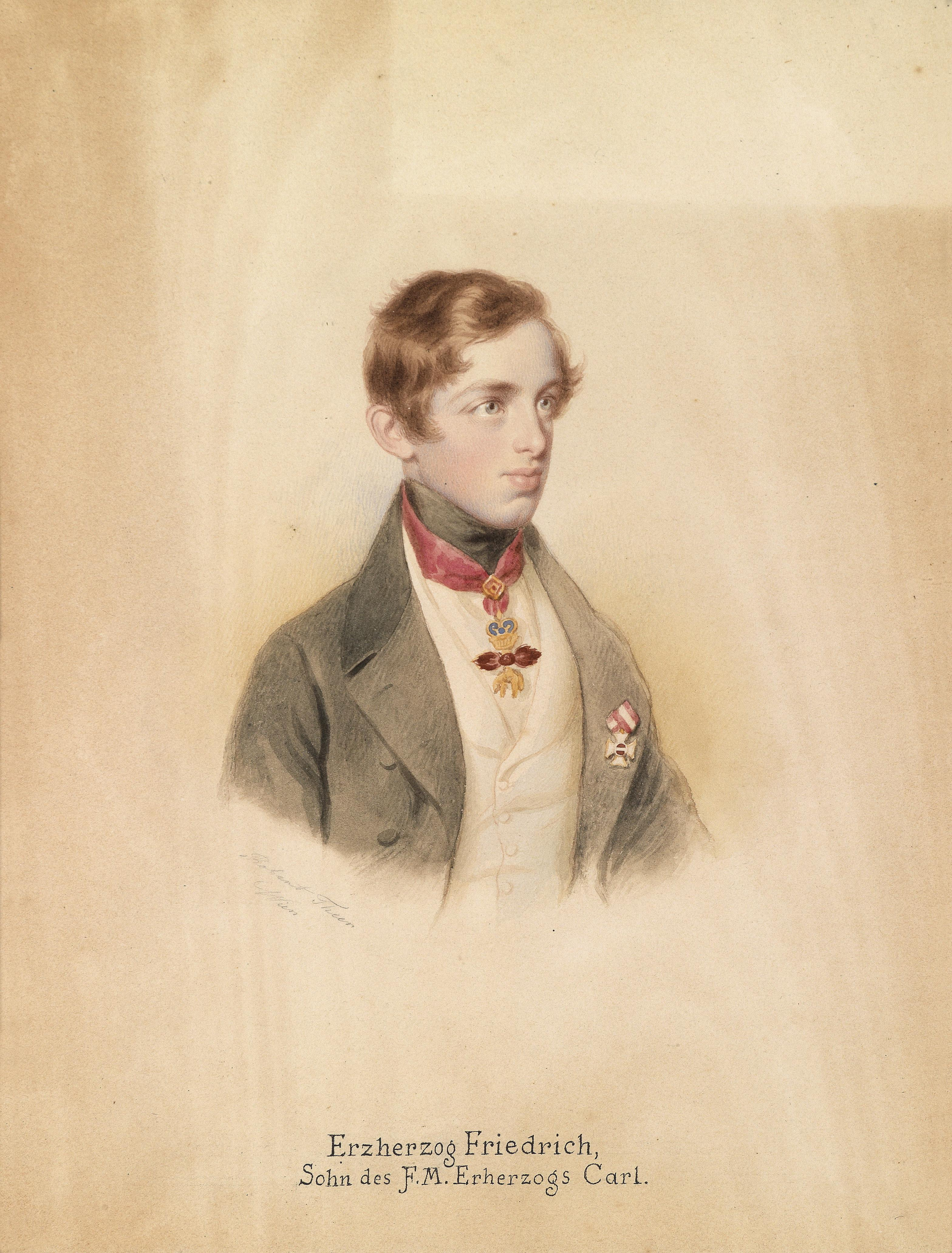 Portrait des Erzherzogs Friedrich Ferdinand Leopold von Österreich (1821-1847) mit dem Orden vom Goldenen Vlies und dem Ritterkreuz des Militär-Maria Theresien-Ordens